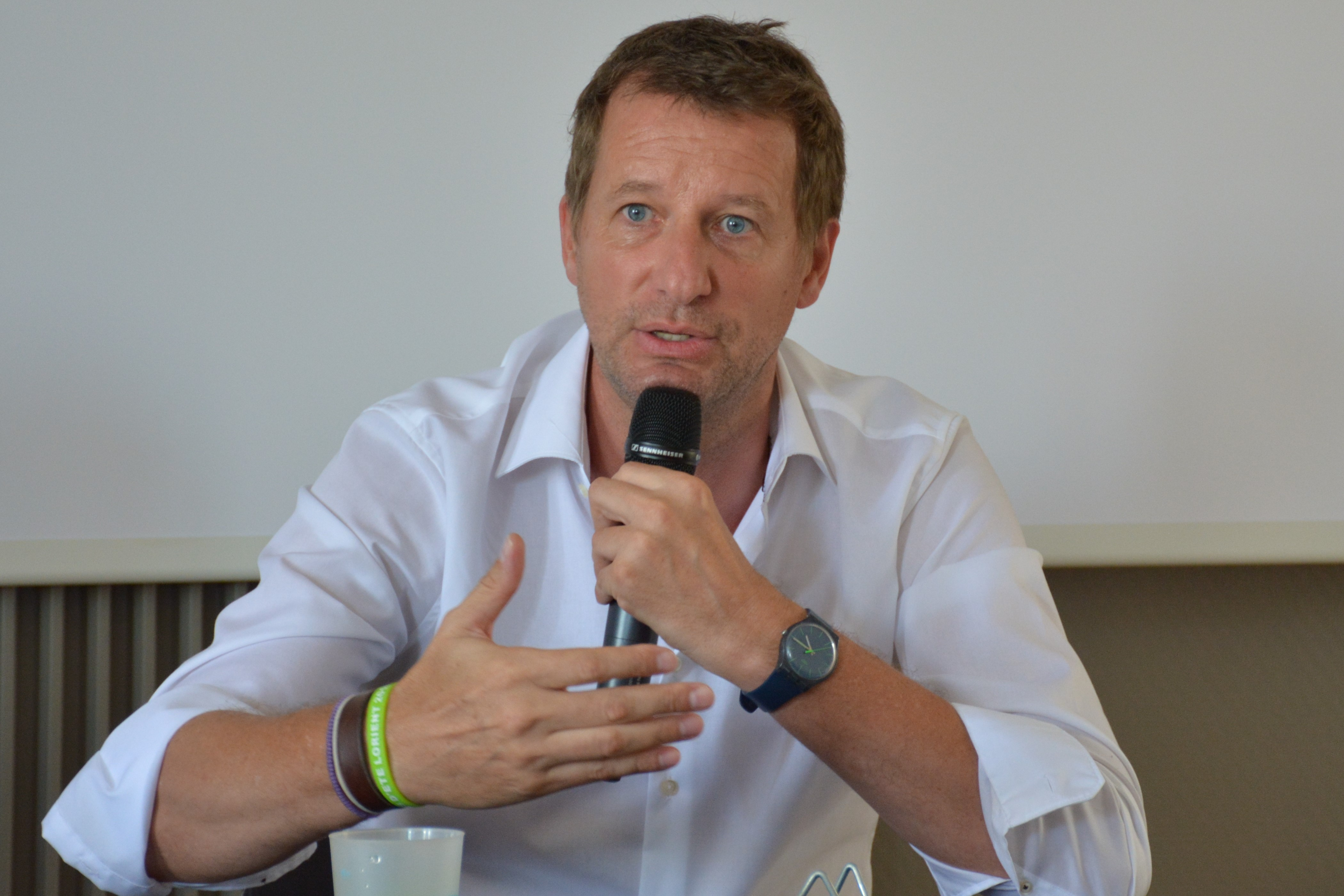 Yannick Jadot aux Journée d'été des écologistes à Lorient